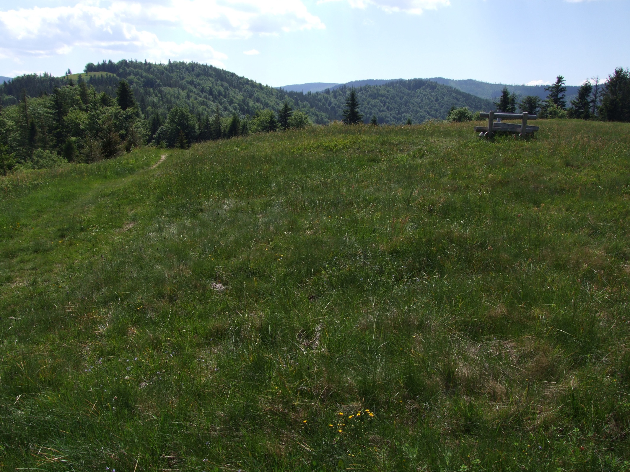 Polana Łąki i widok na Turbaczyk i Wierch Spalone